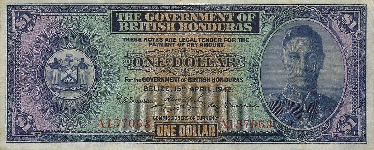 1 dolláros papírpénz előoldala